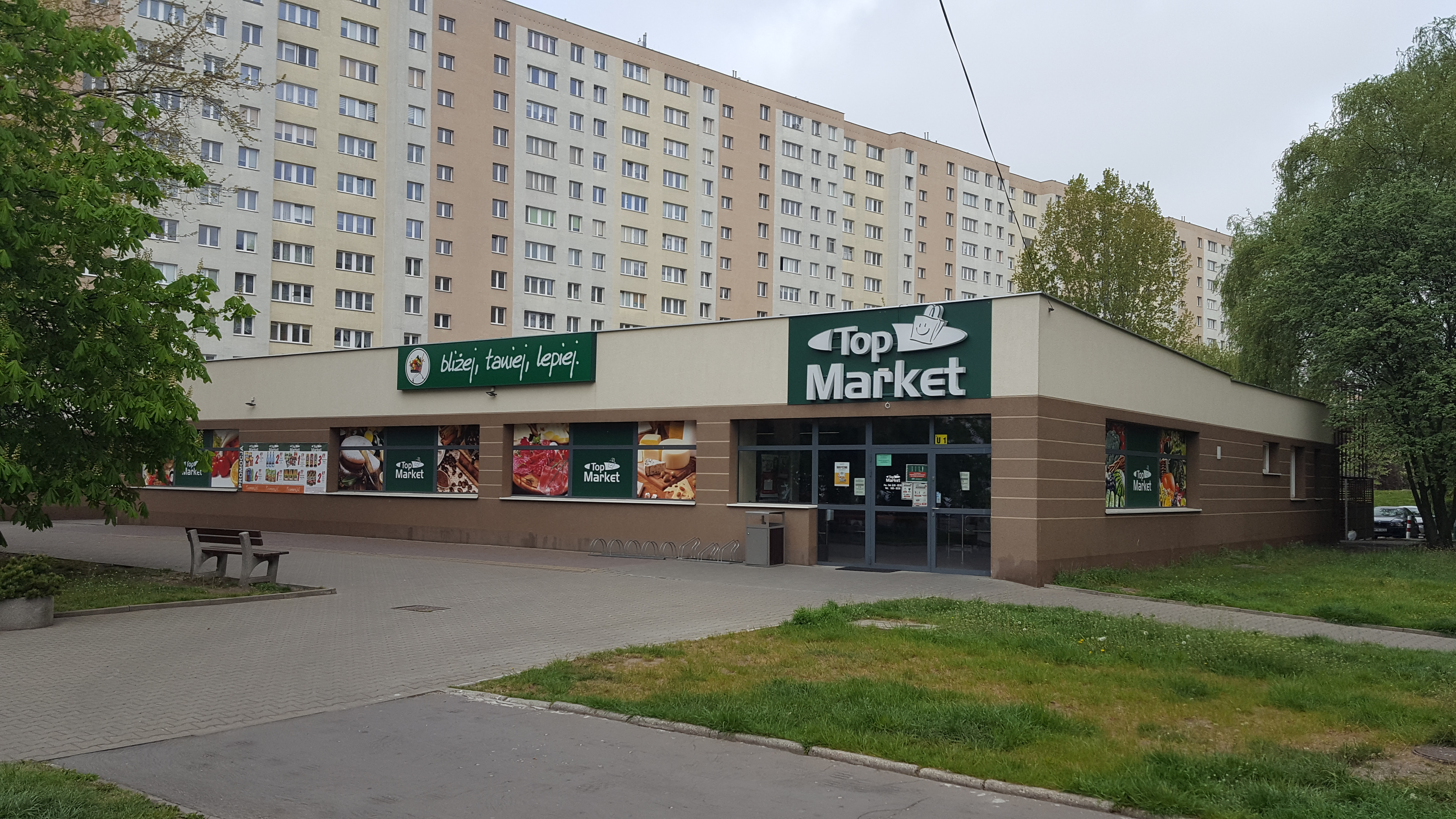 Top Market Warsaw Stegny